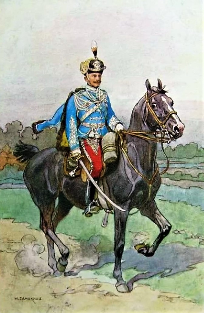 Николай Самокиш. Генерал 13-го гусарского Нарвского полка. Почтовая открытка. Издание "Рубикон"